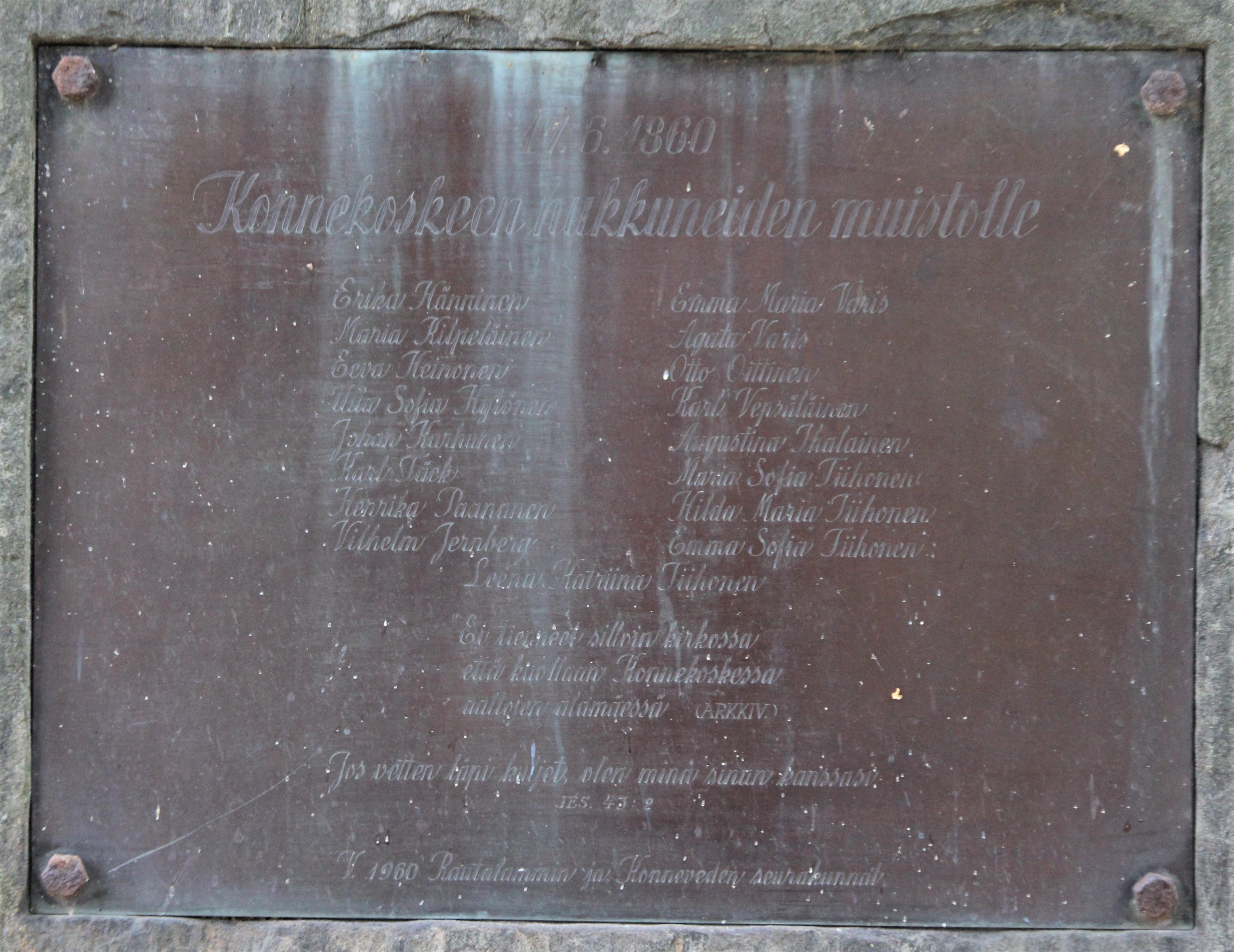 Konnekoskeen 1860 hukkuneiden muistomerkin (1960) muistolaatta. Muistomerkki sijaitsee Rautalammin hautausmaalla Rautalammin kirkonkylässä. Hautausmaan (kappelin) osoite on Kuopiontie 15, Rautalampi.